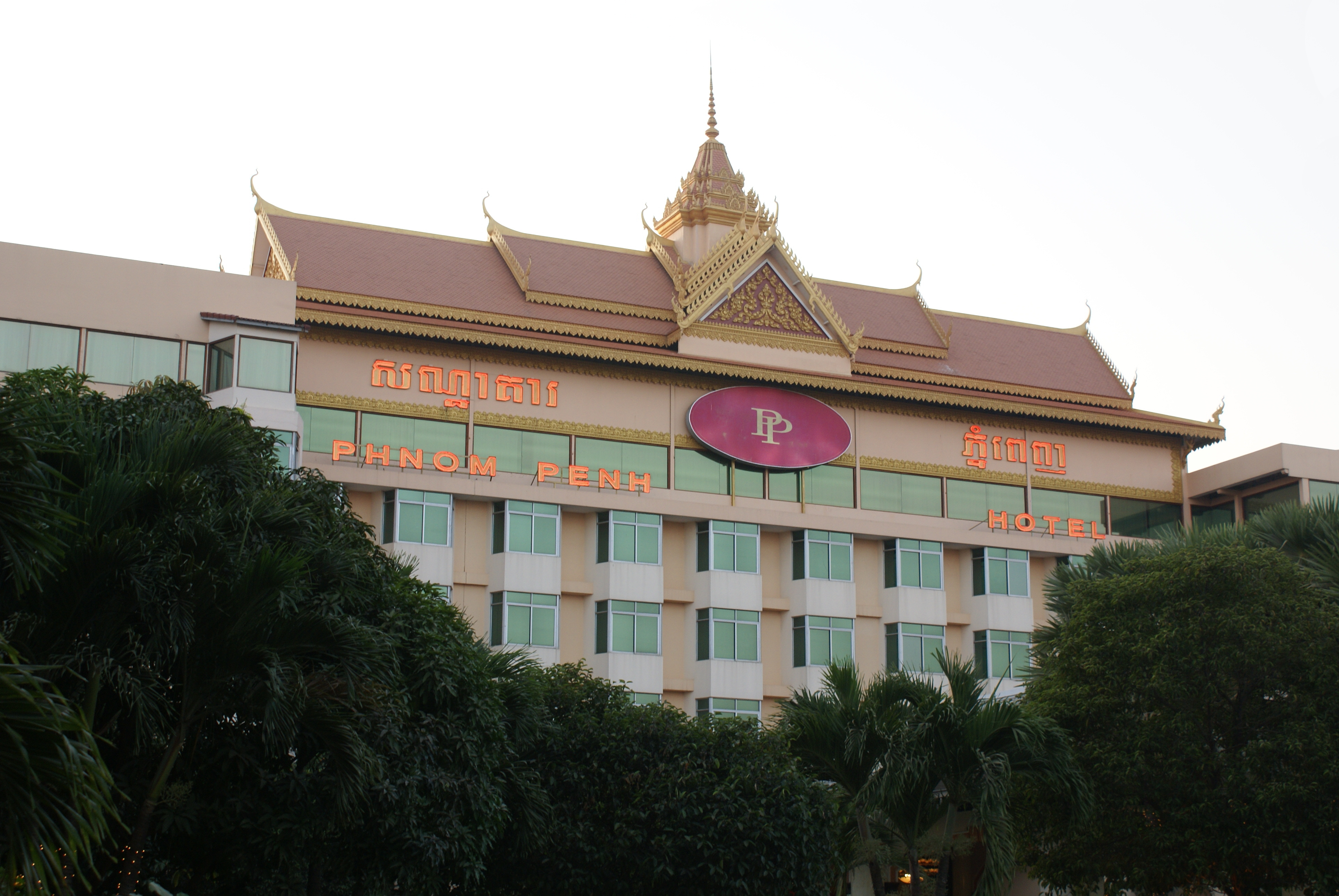 Phnom Penh Hotel, Cambodia